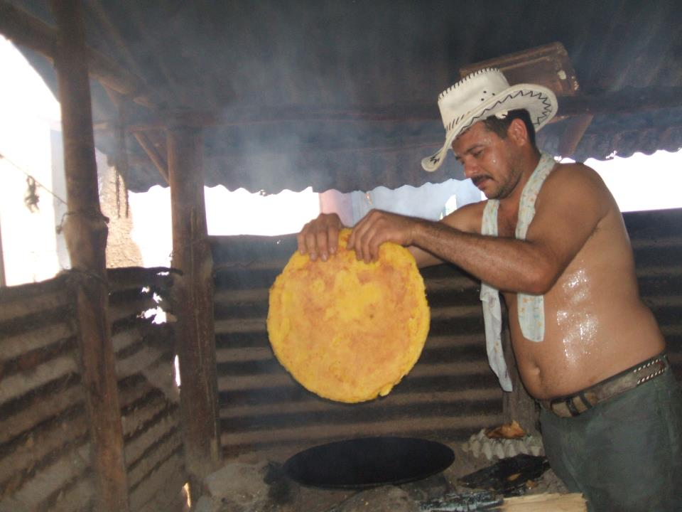 Cachapas en la Trinidad de Orichuna, estado Apure _Venezuela (2009)